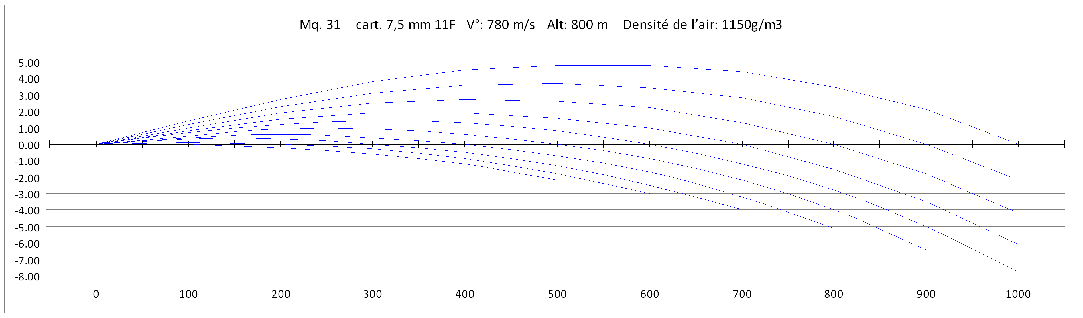 Graphique des ordonnées du mousqueton 1931